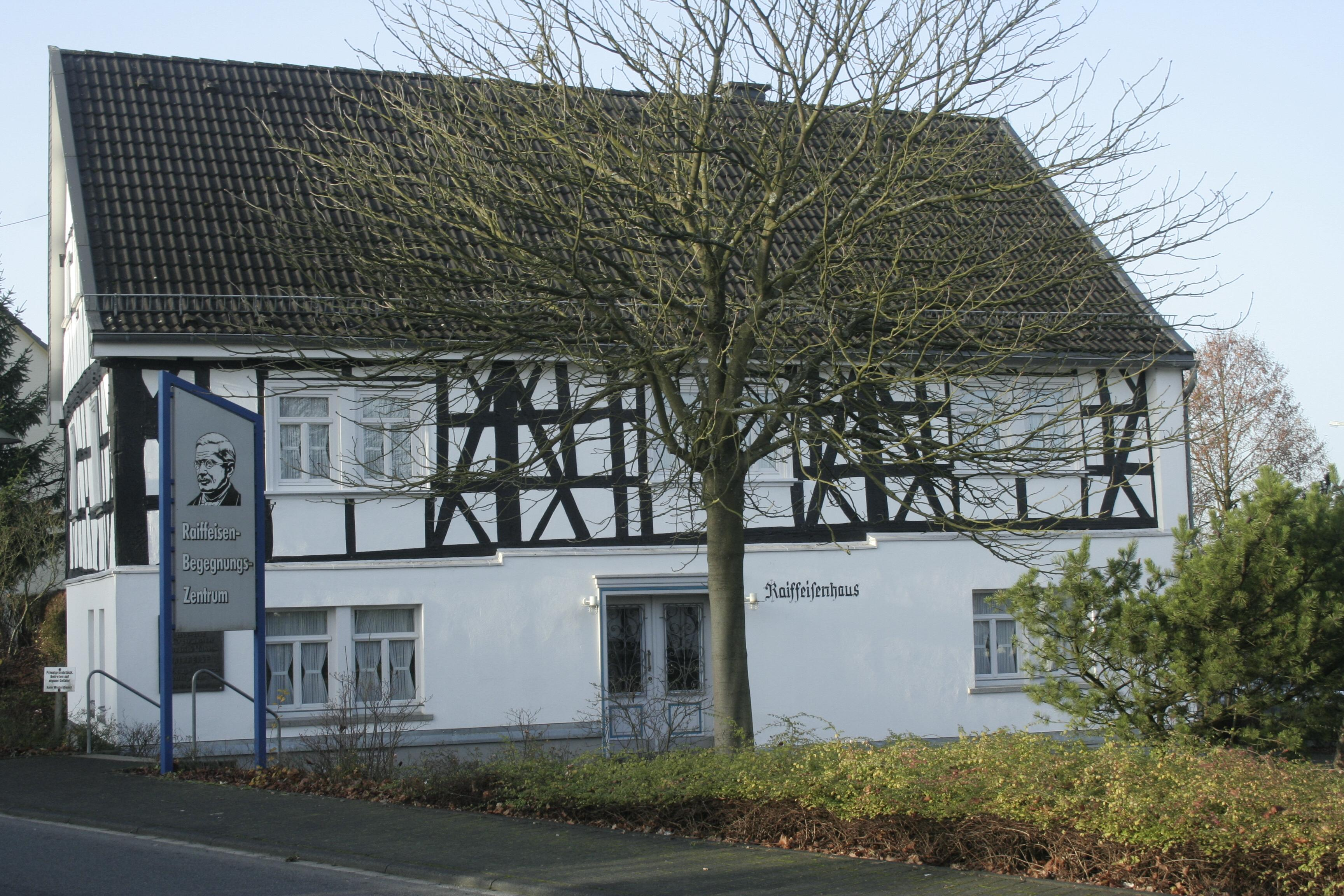 Raiffeisenhaus und Begegnungsstätte in Weyerbusch